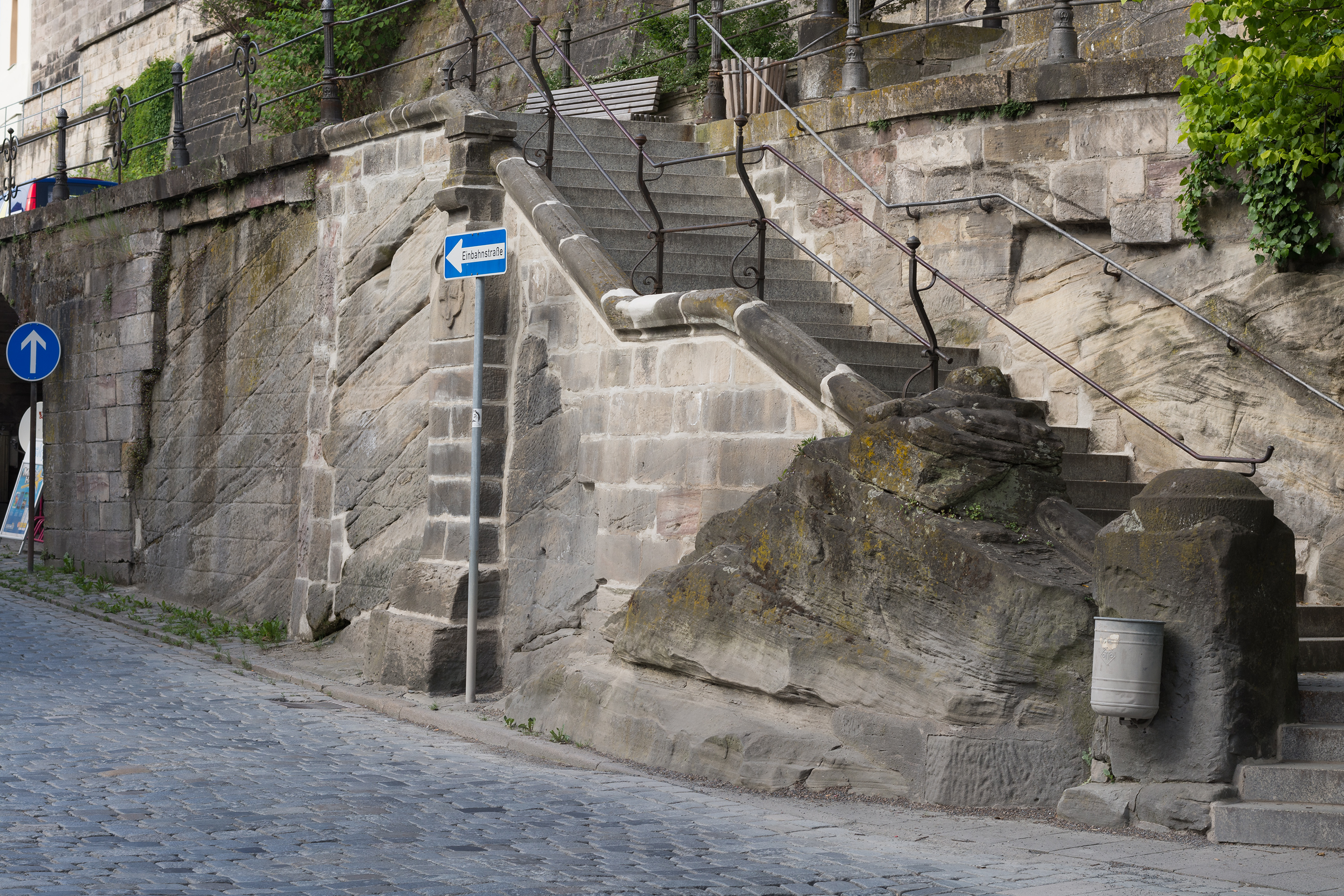 Felsfundamente des Bamberger Tors in Kronach.